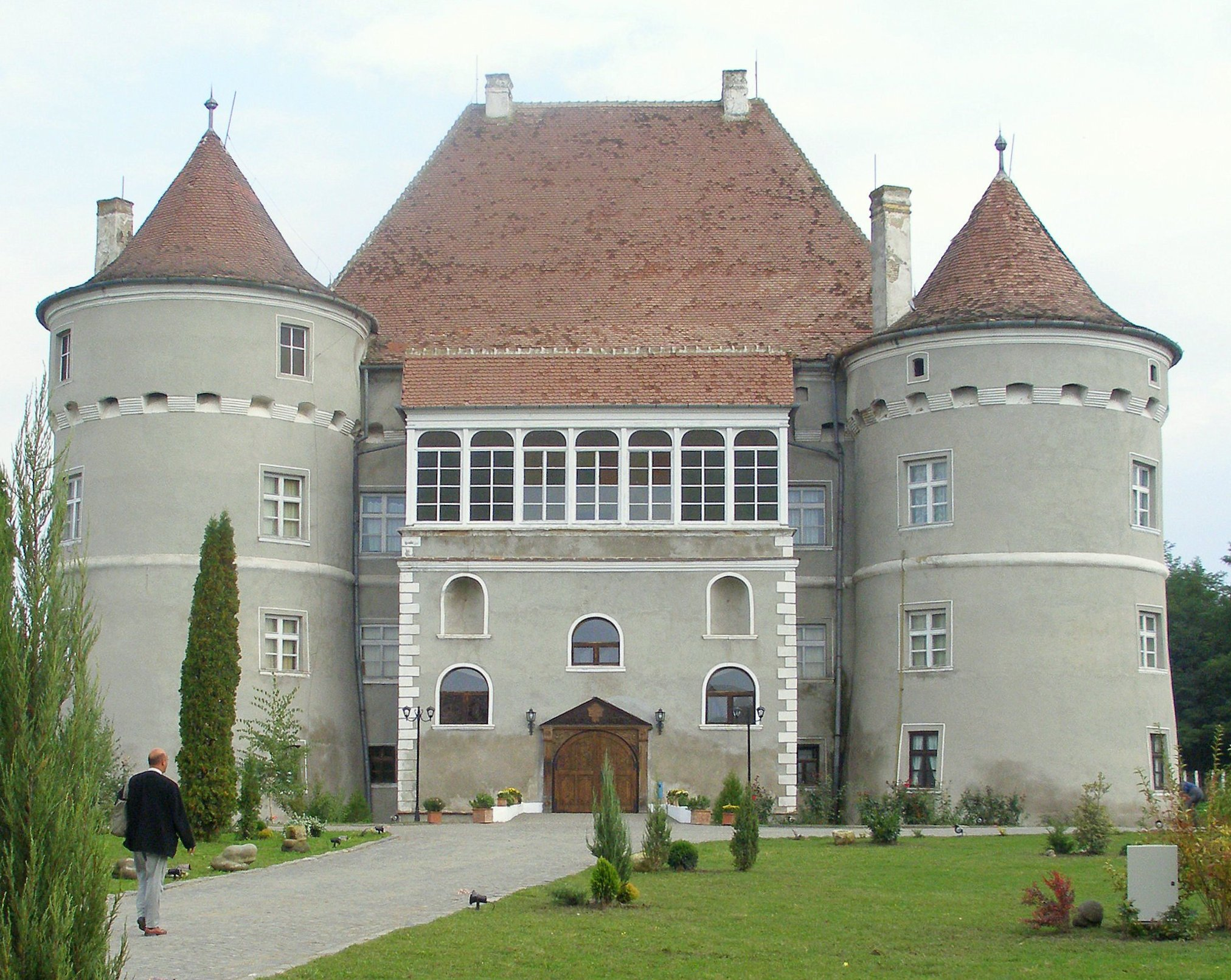 Castelul Jidvei (fost Haller) din Cetatea de Balta. Fotografie facuta in Septembrie 2005 din curtea interioara.